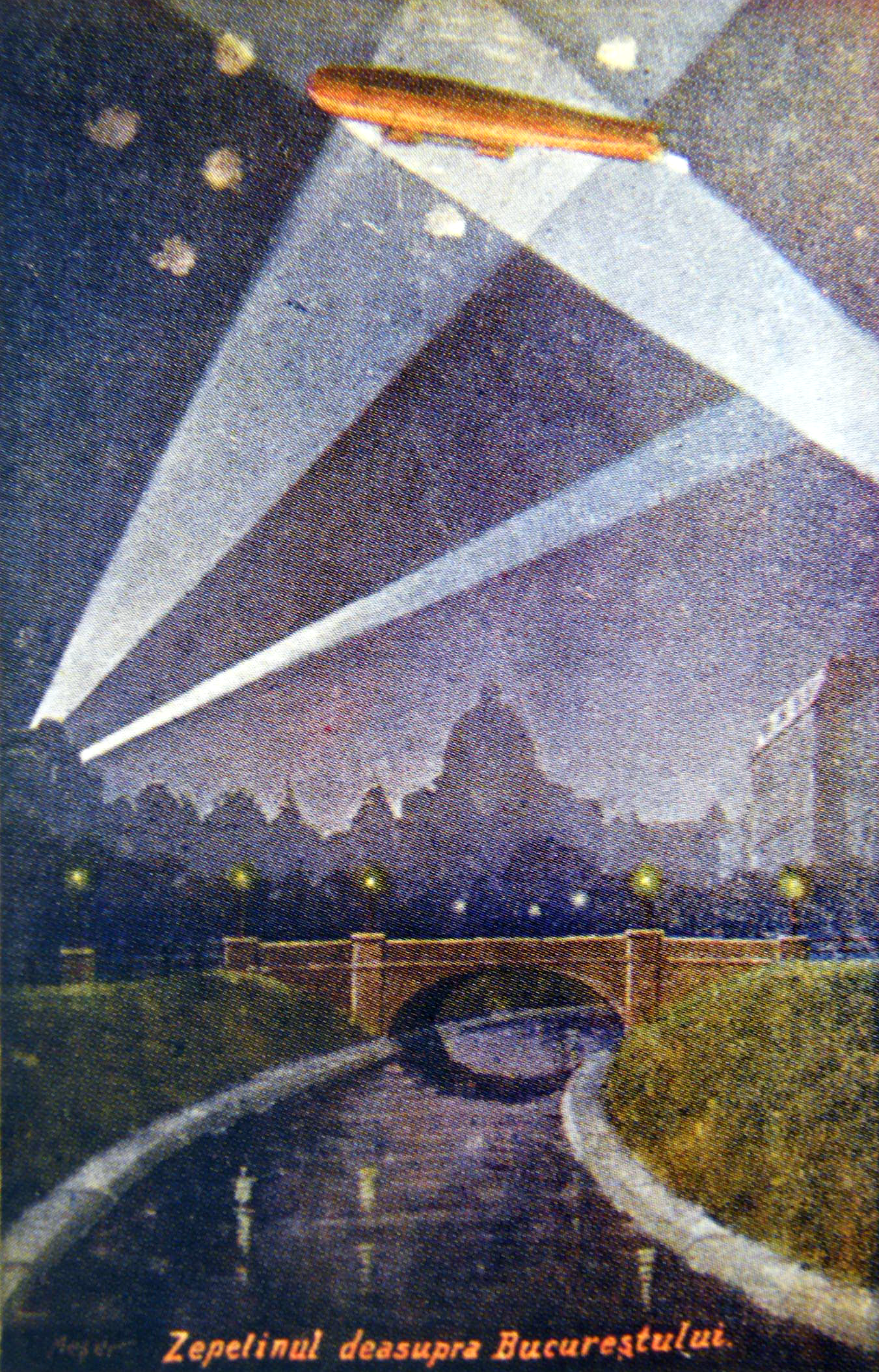 Zepelin german deasupra Bucurestiului - 1916